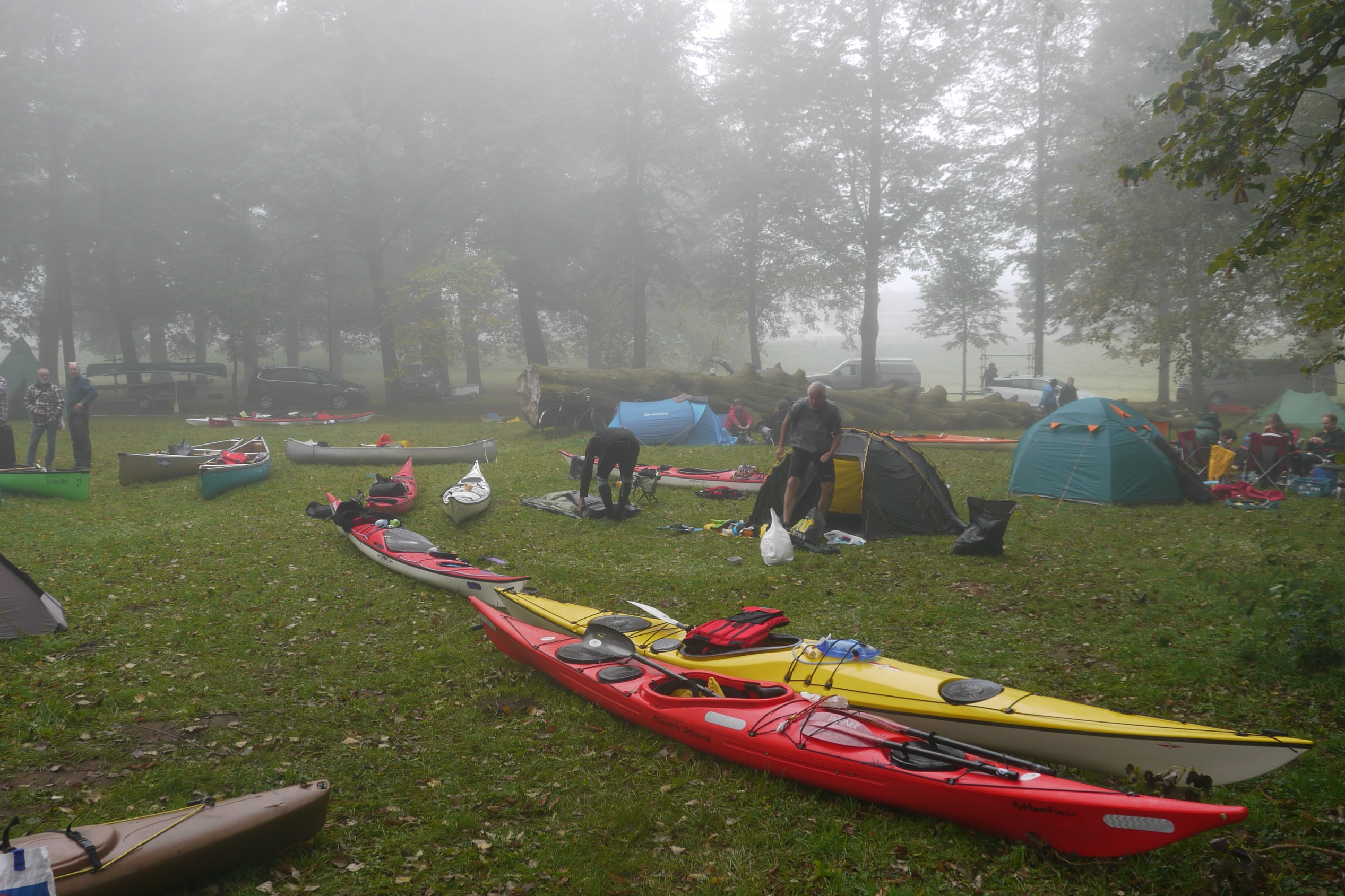 Kamperen bij camping De Worp in Deventer (westkant van de IJssel) voor de start van de Veluwerally 2017.